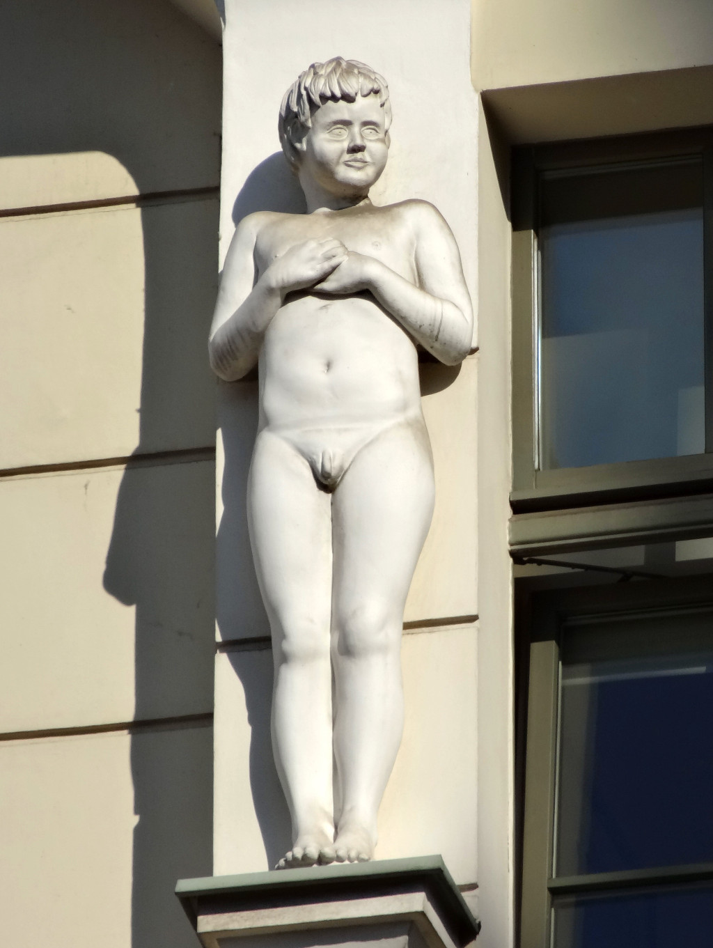 Kamienica przy ul. Gdańskiej w Bydgoszczy